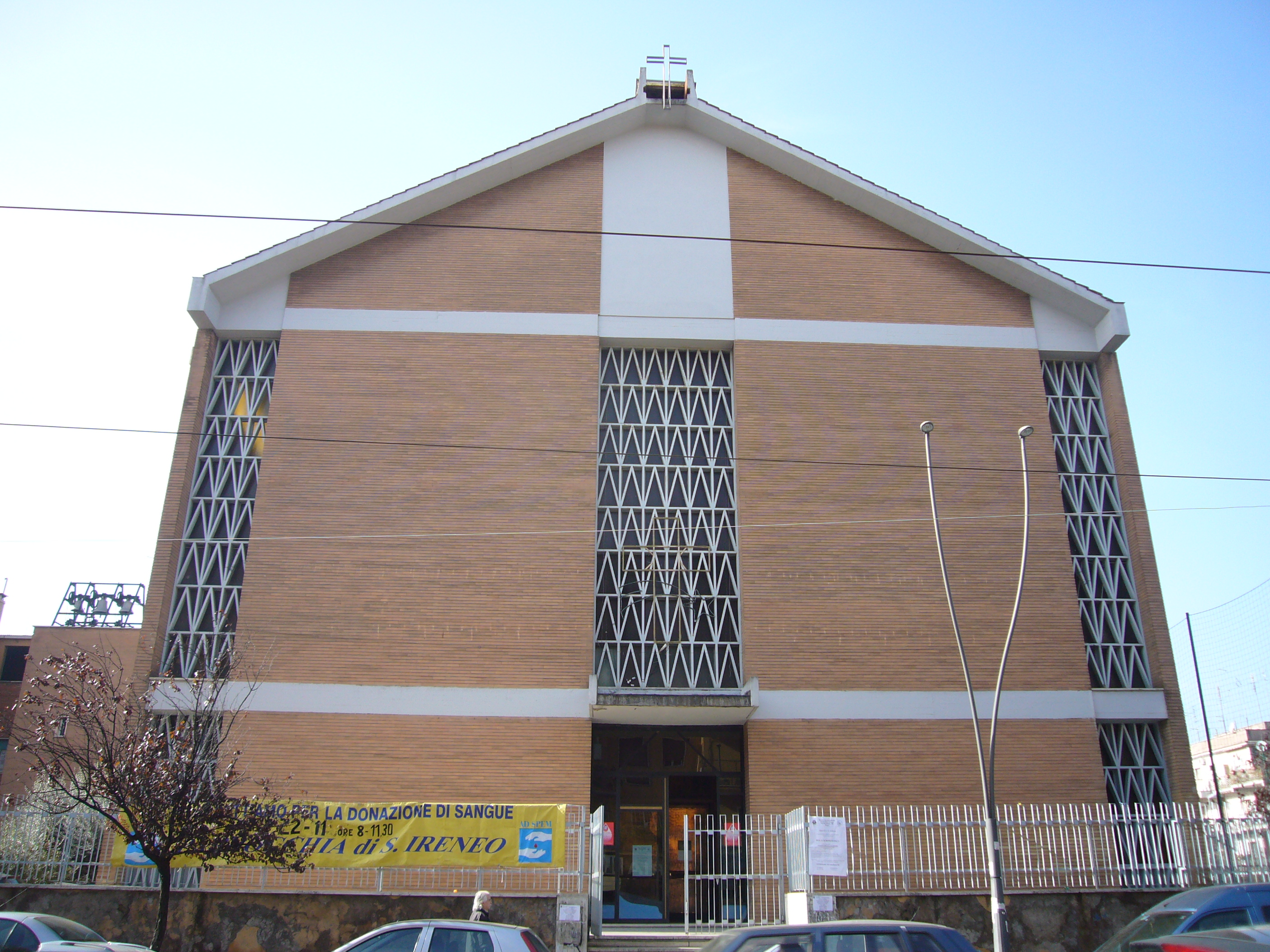 Roma, Centocelle: sant'Ireneo, facciata